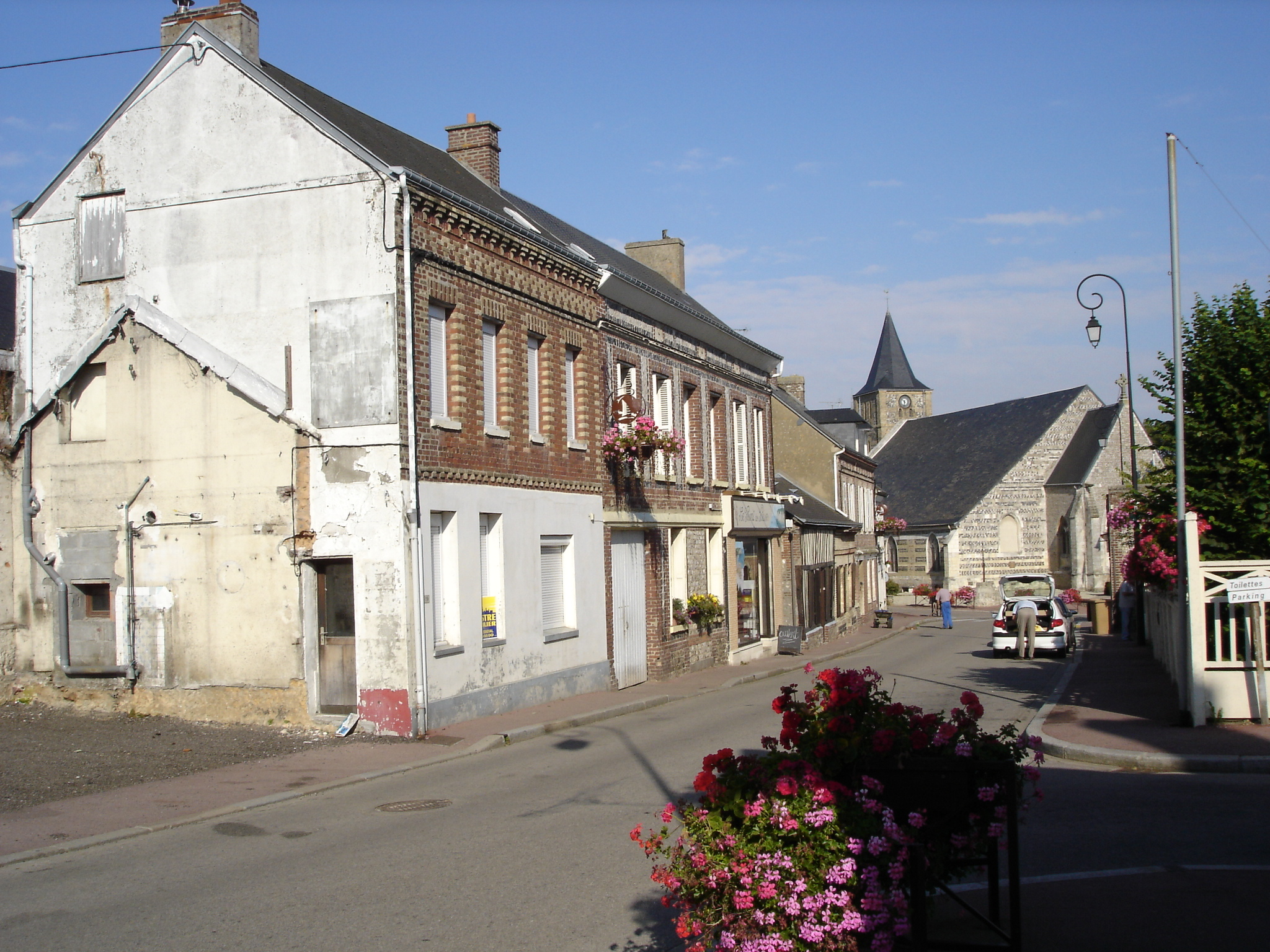 Le centre du village de Saint-Jouin-Bruneval (Seine-Maritime) en 2005 -- Photo amateur prise par moi-même